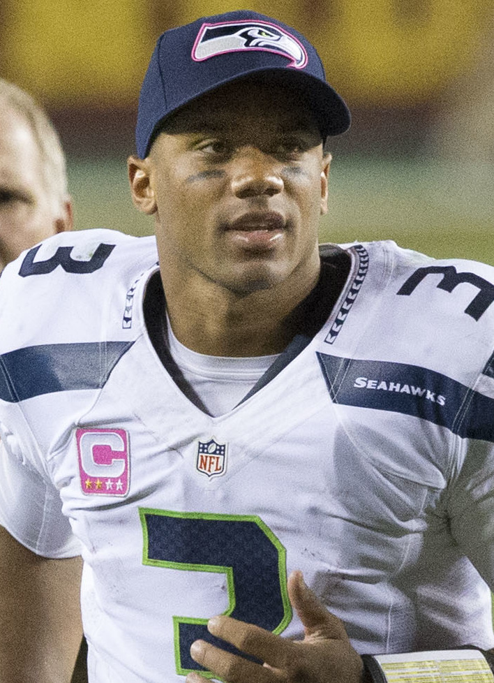 Seahawks at Redskins 10/6/14